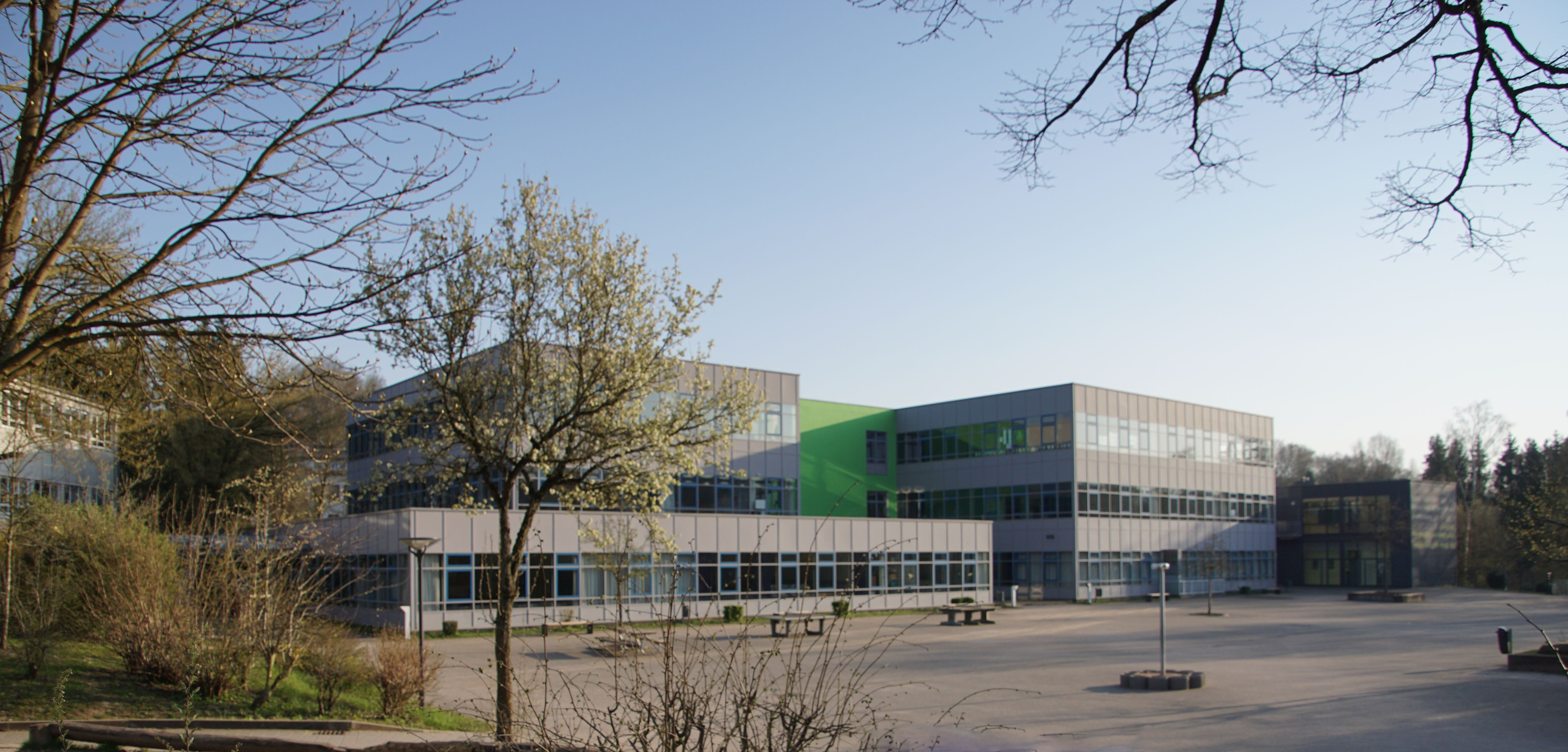 Gesamtschule Sulzbachtal